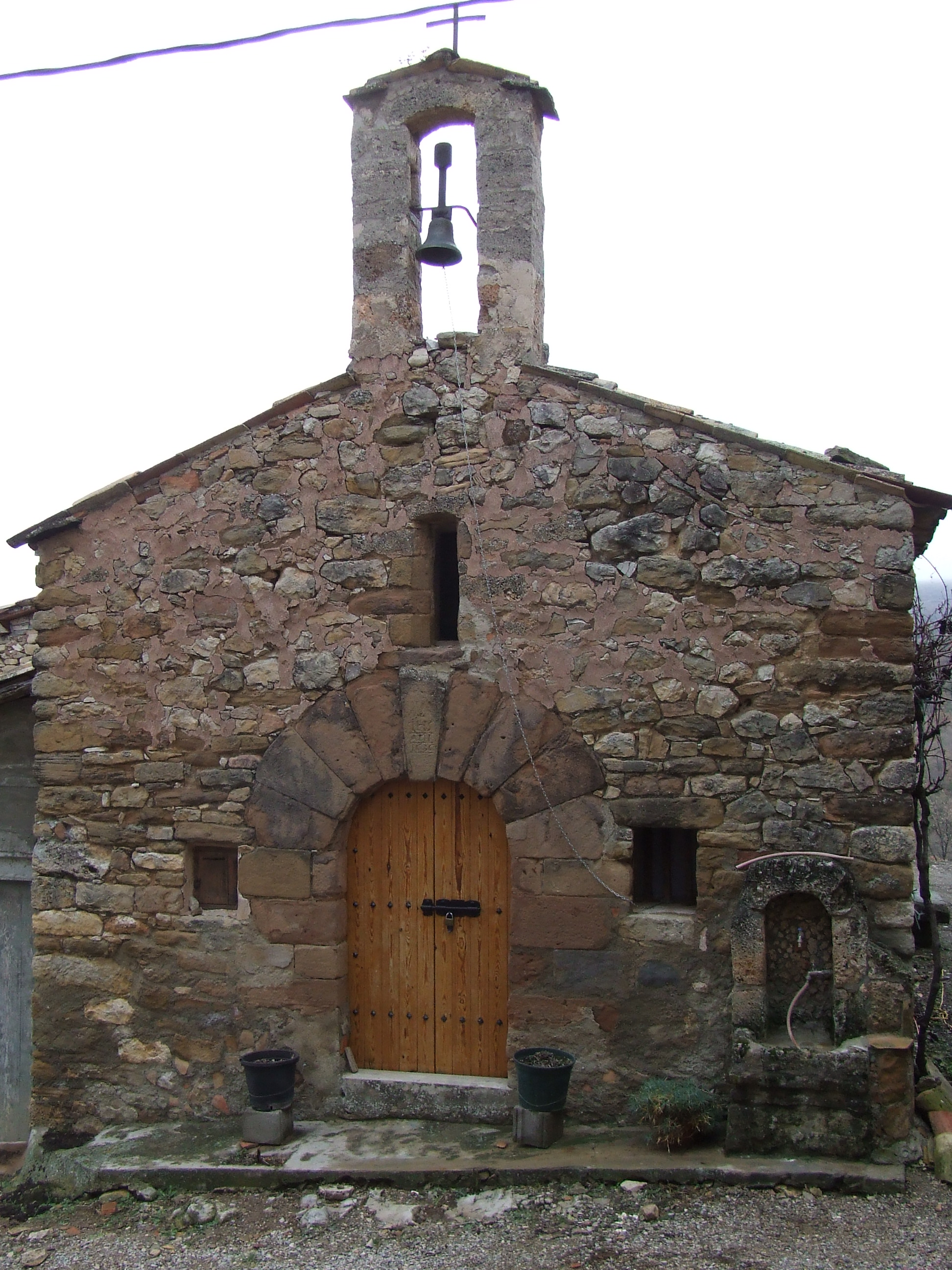 L'església de Merea (Sant Salvador de Toló, Gavet de la Conca, Pallars Jussà)